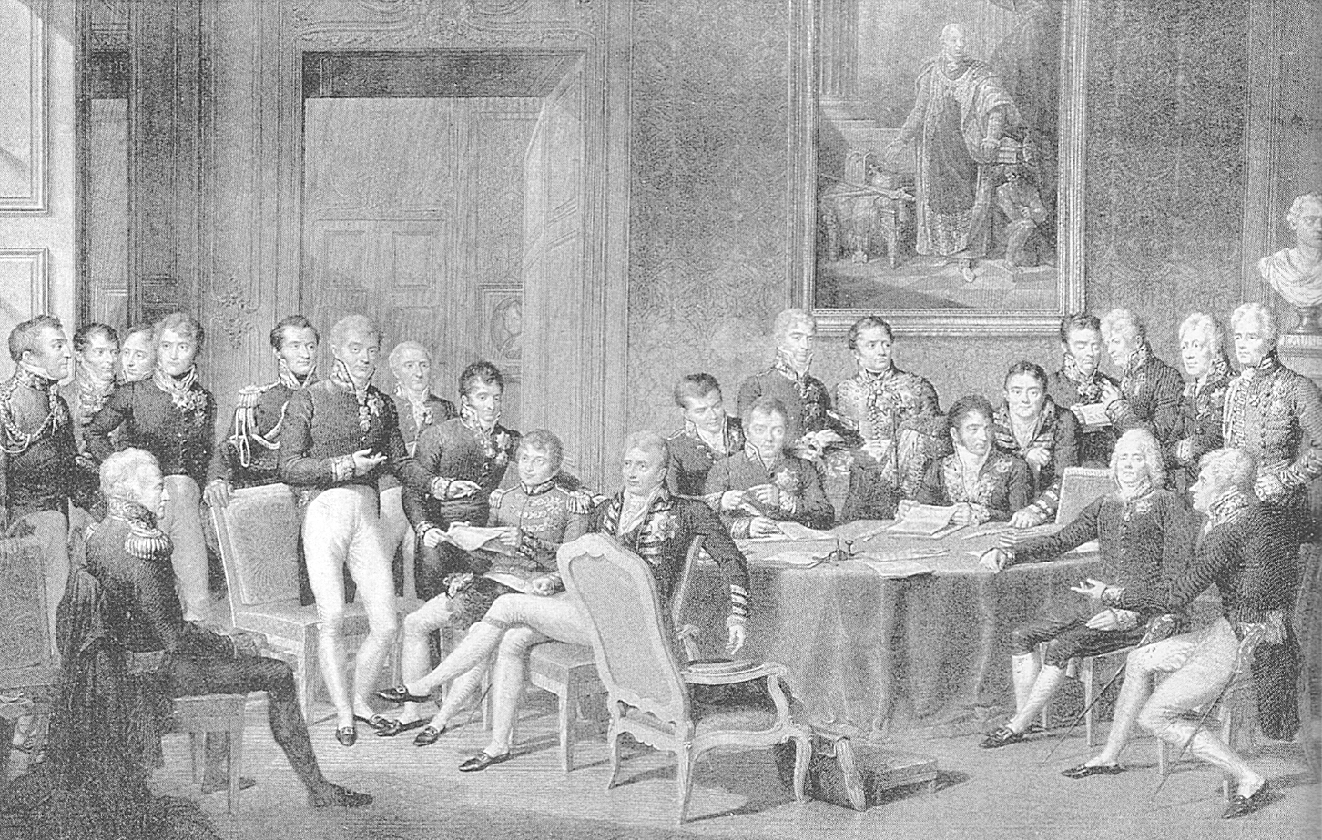 Congrès de Vienne On peut reconnaitre: à gauche, debout et de profil, le duc de Wellington (Royaume-Uni); au premier plan, debout devant un fauteuil, Metternich (Autriche); au premier plan, assis les jambes croisées, Castlereagh (Royaume-uni); derriere la table, un papier à la main, Nesselrode (Russie); à droite, assis le bras droit posé sur la table, Talleyrand (France)